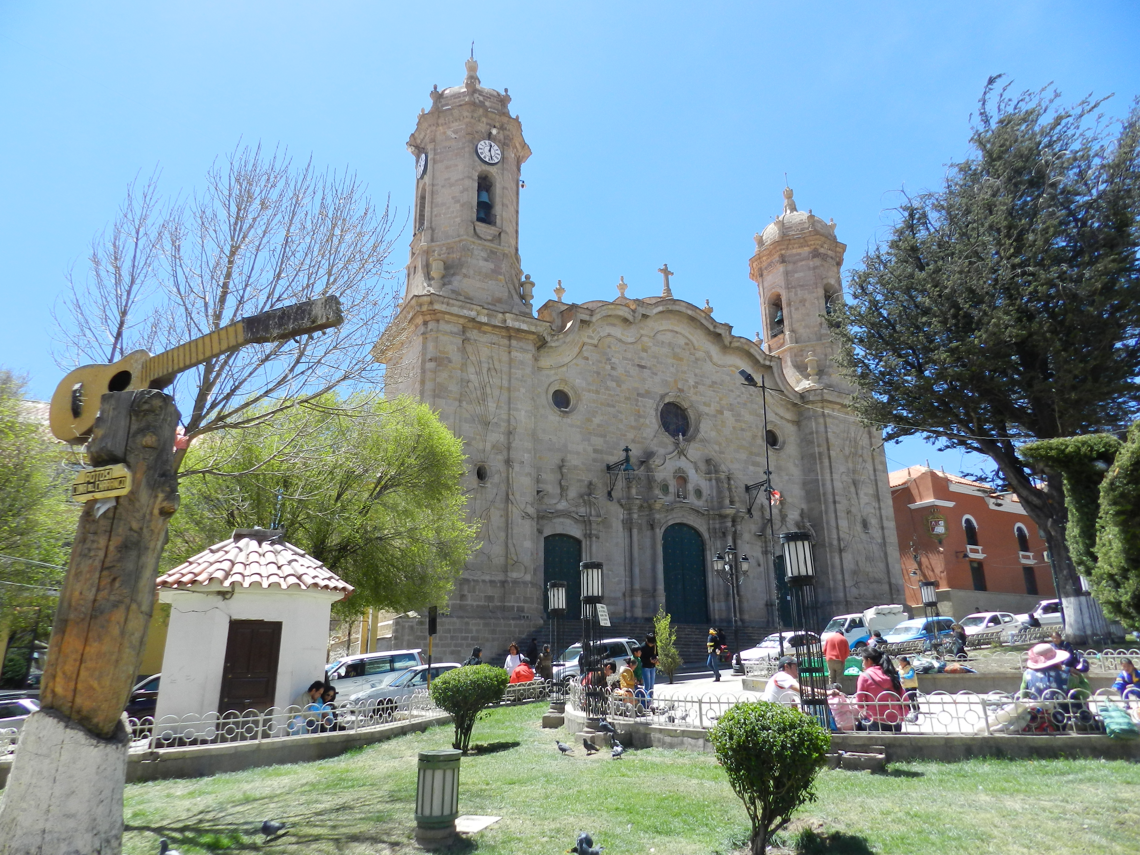 Catedral This medium shows the protected monument with the number P/00-017 in Bolivia.